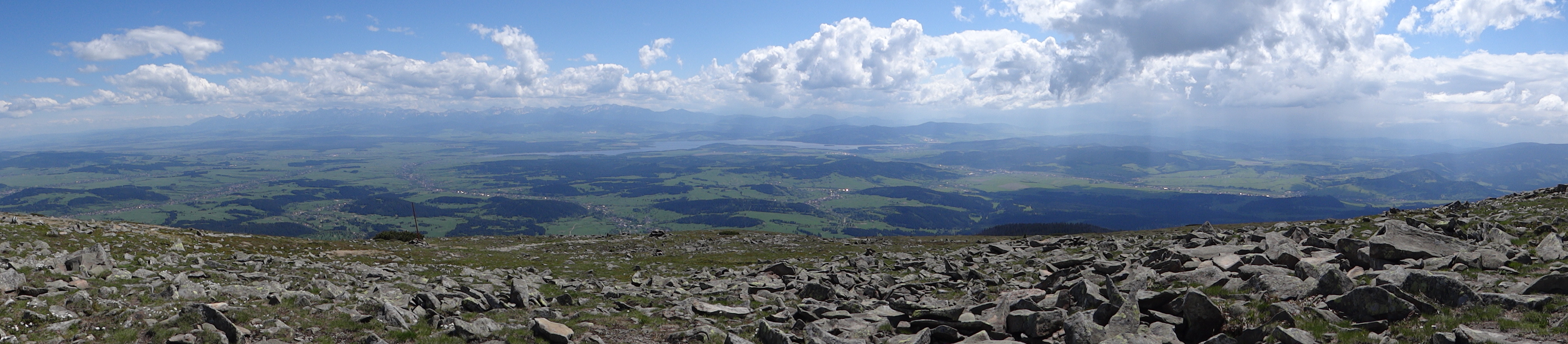 panorama na południe z Babiej Gory